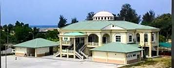 Masjid laut putatan